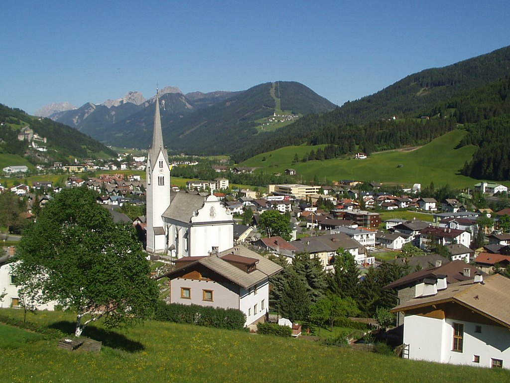 Sillian in Osttirol (Österreich), Blick Richtung Osten (Lienzer Dolomiten)